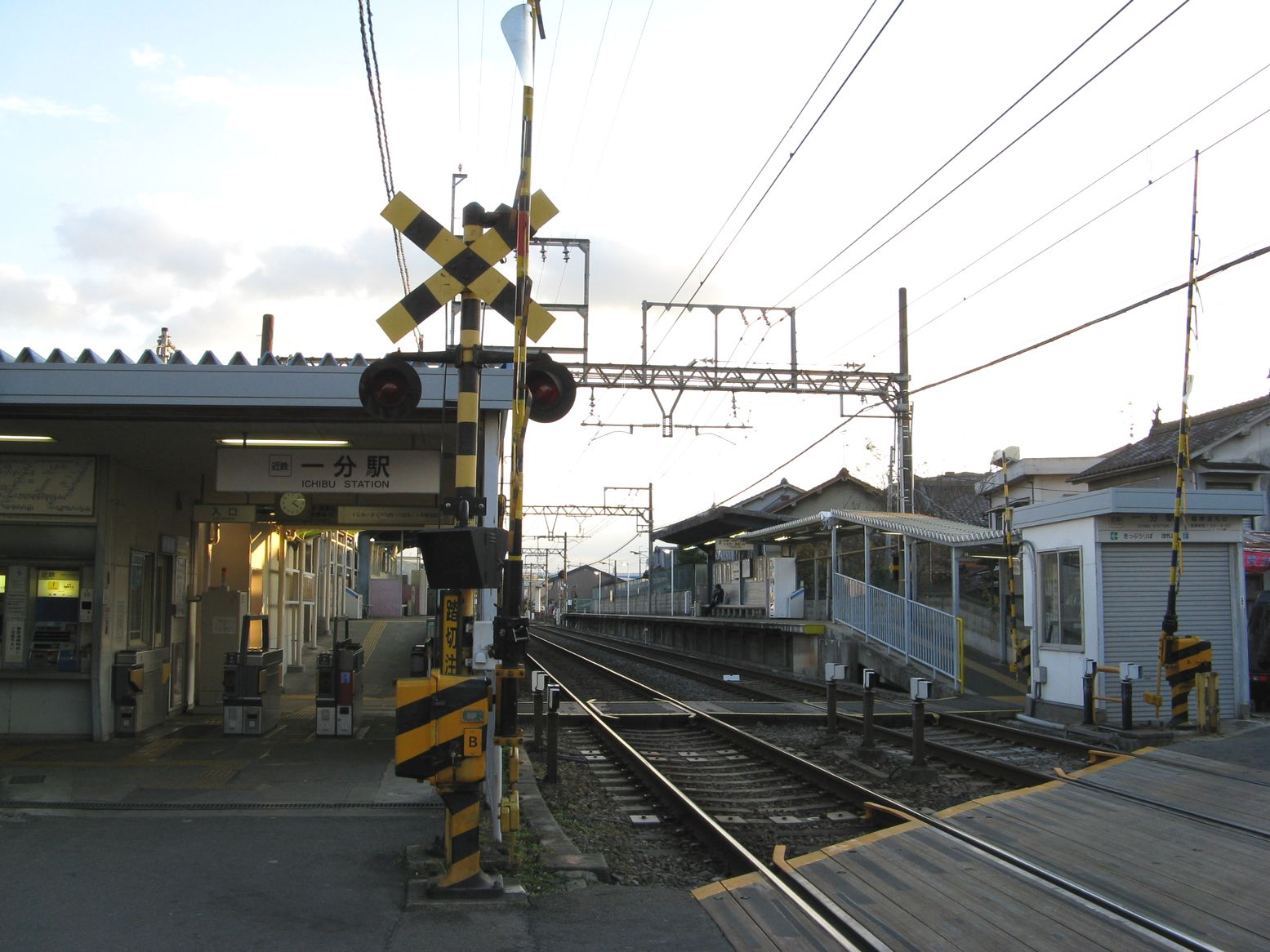 一分駅